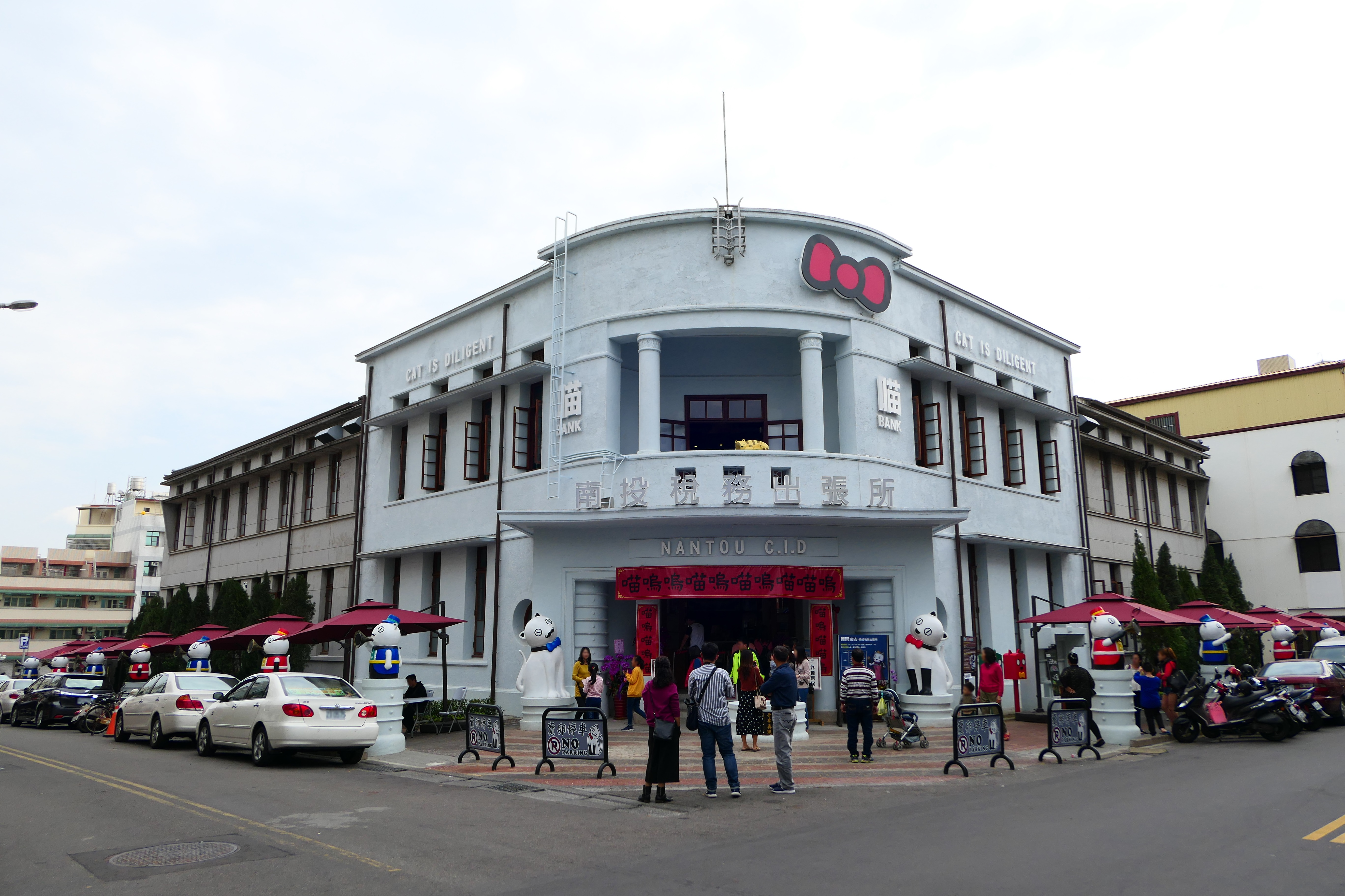 中文（台灣）: 南投稅務出張所，2019年整修開放後的樣子